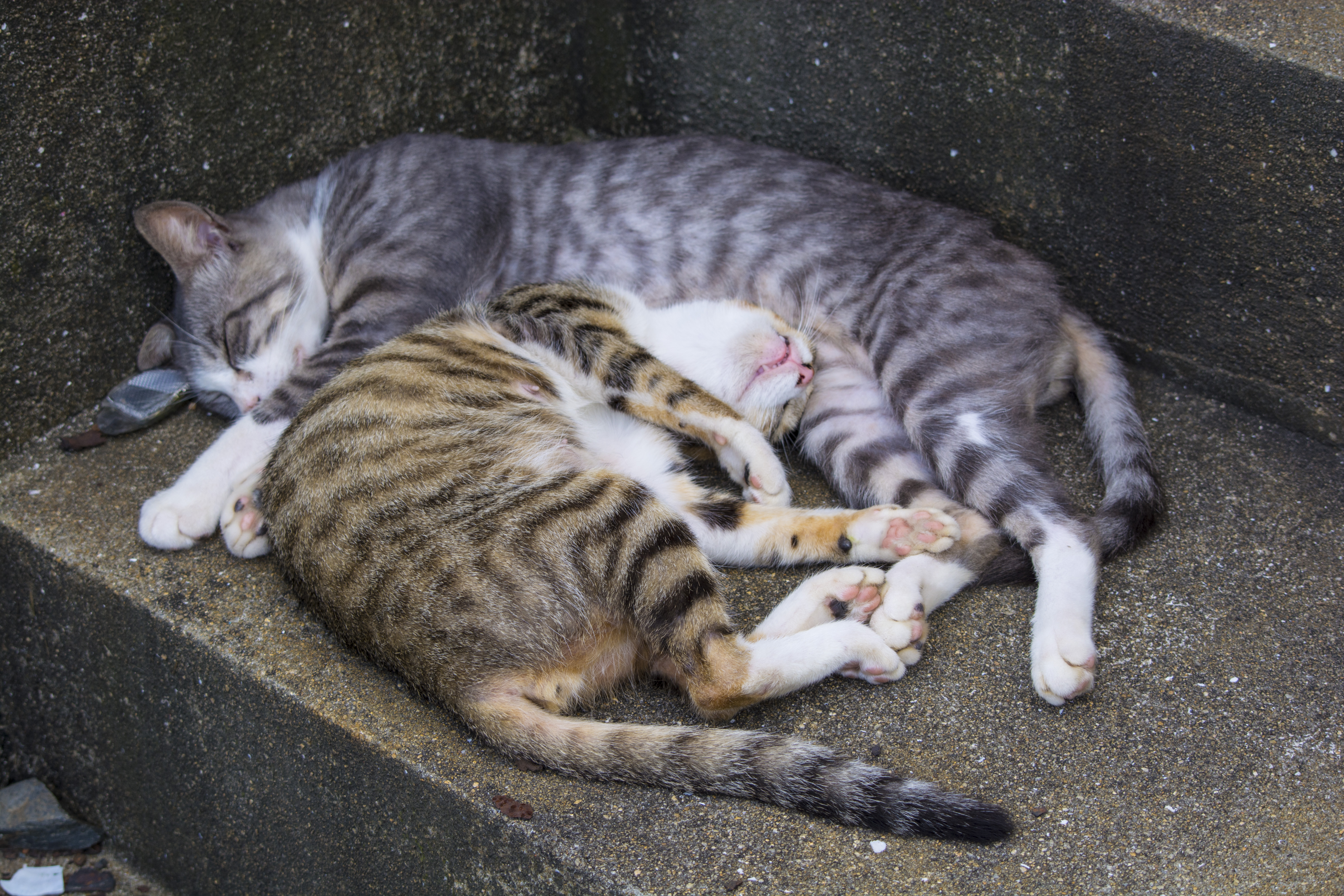 相島は、野良猫が多く生息していることで有名となり、「猫の島」と呼ばれている。